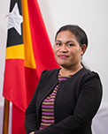 Lídia Norberta dos Santos Martins, Abgeordnete des Nationalparlaments Osttimors